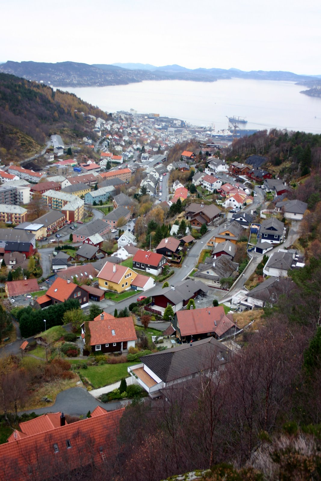 Utsikt fra Løvstakken / Ravnefjellet over østsiden av Melkeplassen og ned mot Damsgård og Laksevåg.